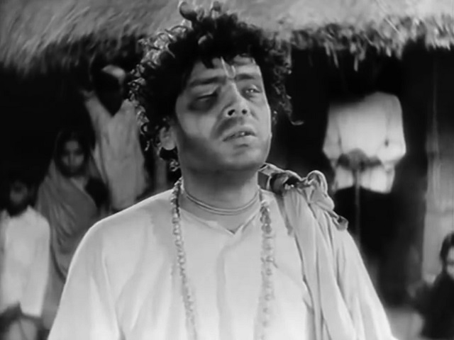 K.C. Dey dans Devdas (version hindi) (1935)